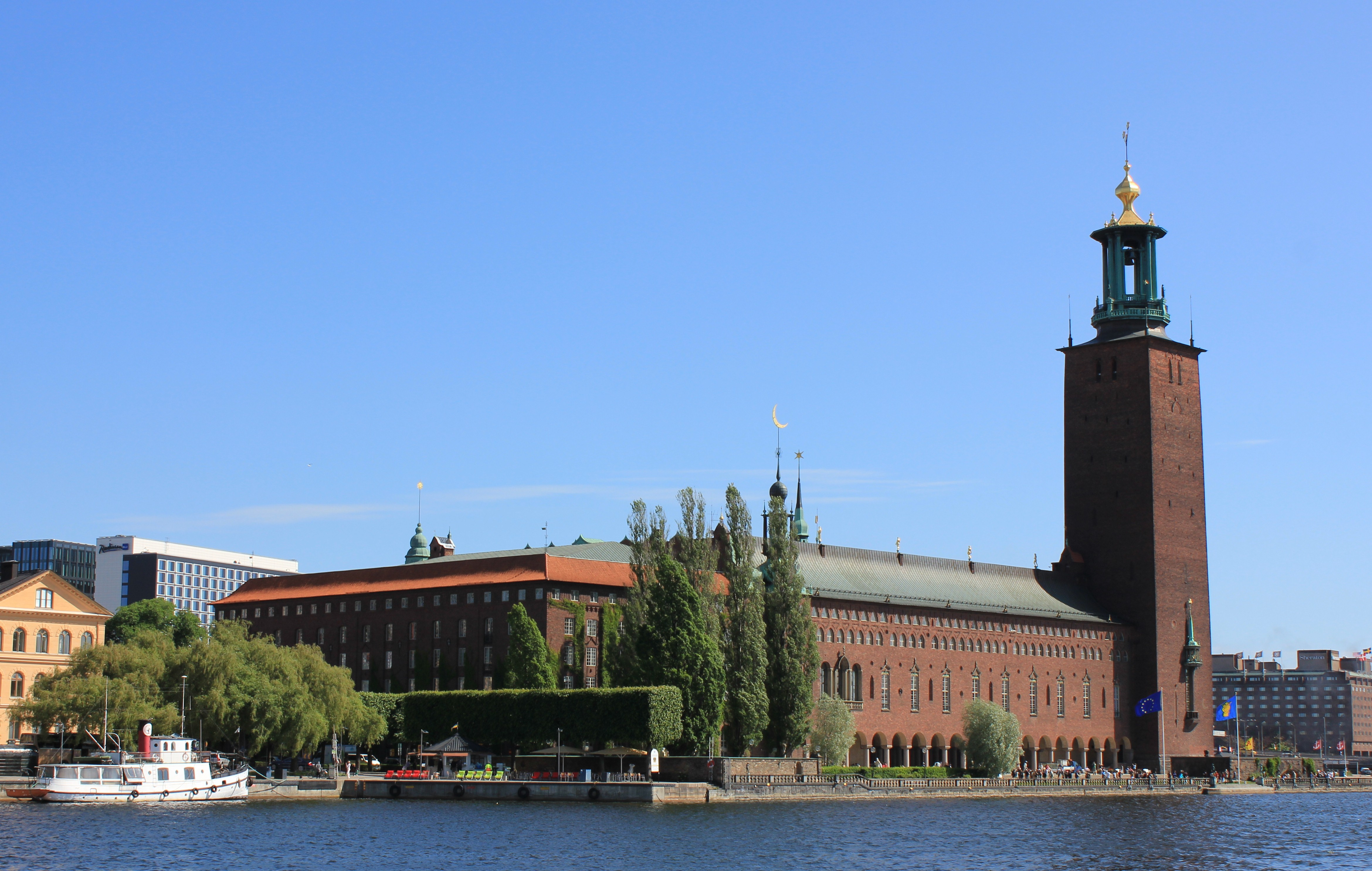 Rådhuset i Stockholm. The City Hall of Stockholm. Stadshuset i Stockholm.